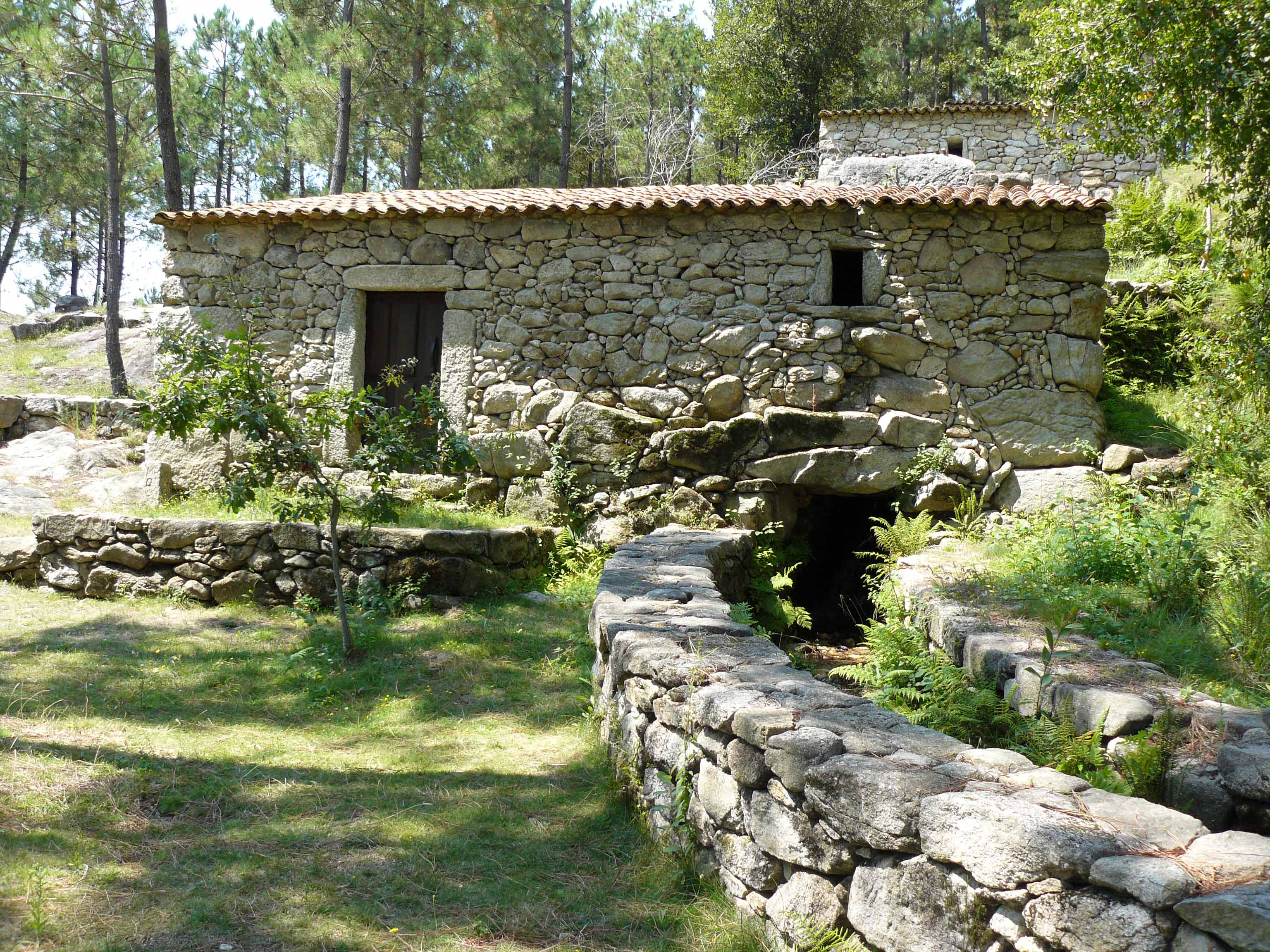 Detalle doutro muíño do Picón